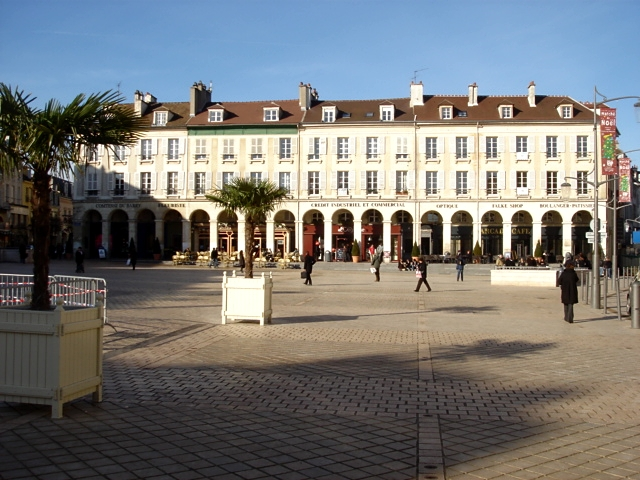 Immeuble XIXe à arcades et couverts, place du Marché-Neuf, à Saint-Germain-en-Laye.